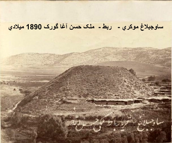 Gawerk - Rabat- hasan agha- مهاباد - ربط - ملک حسن آغا گورک-1890